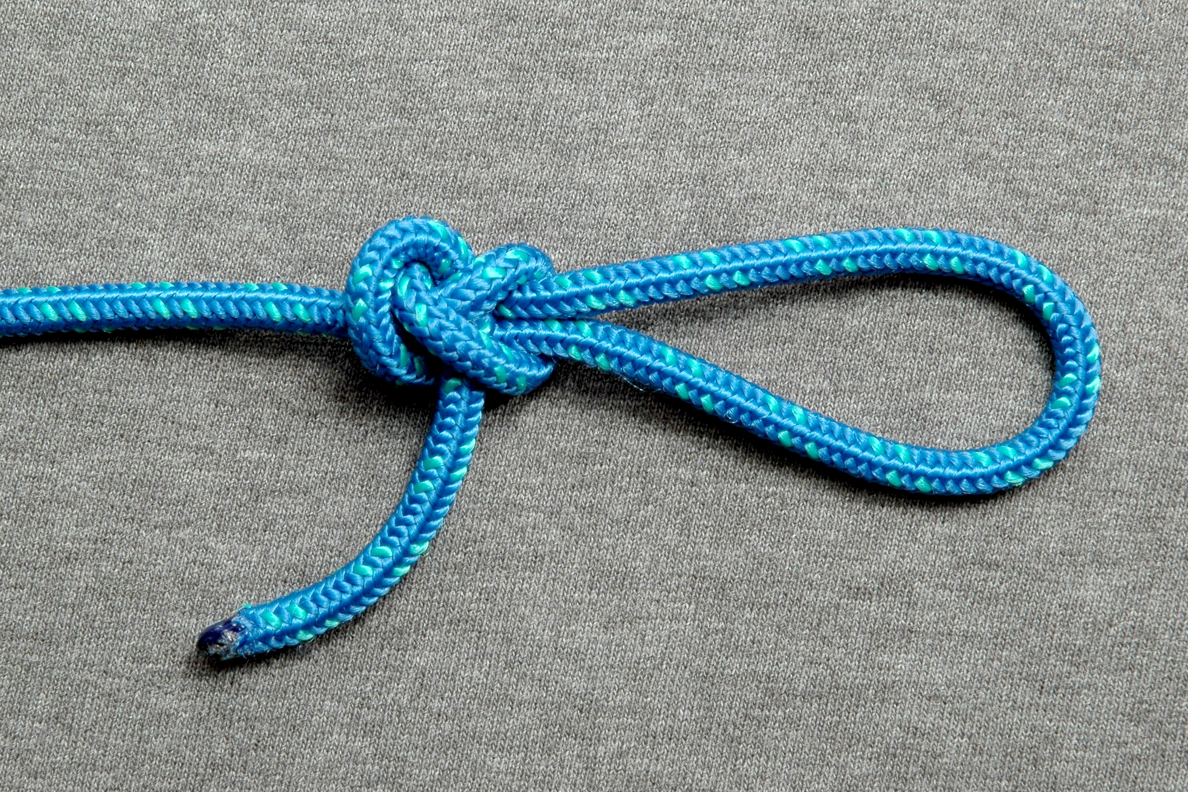 Angler's loop knot (ABOK #1017)